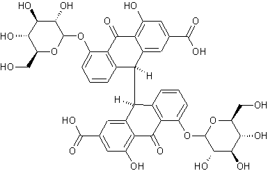 Senósido A, di-O-glucósido de reína diantrona.